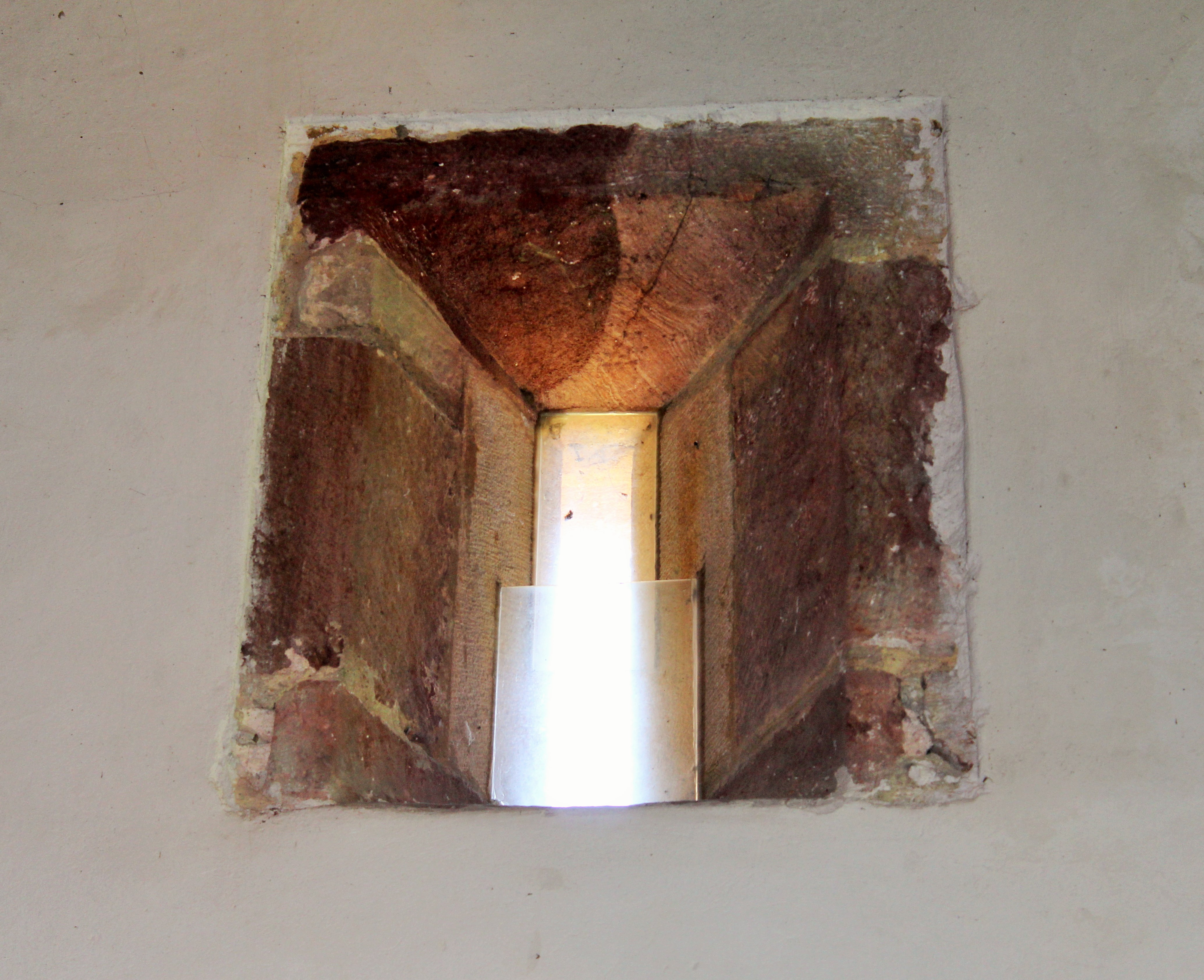 Ventana al norte